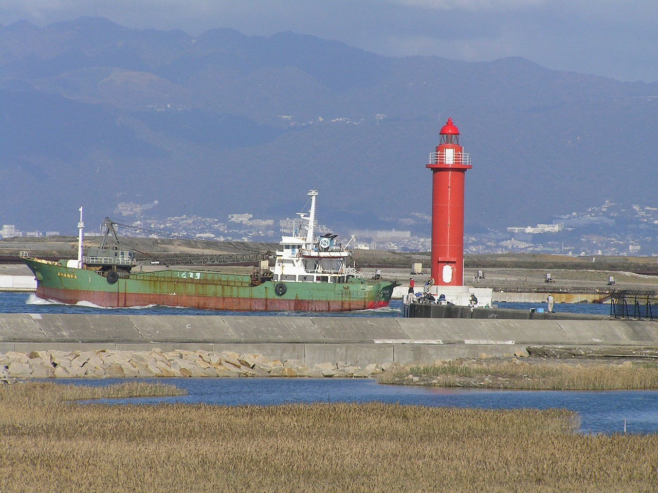 大阪南港野鳥園